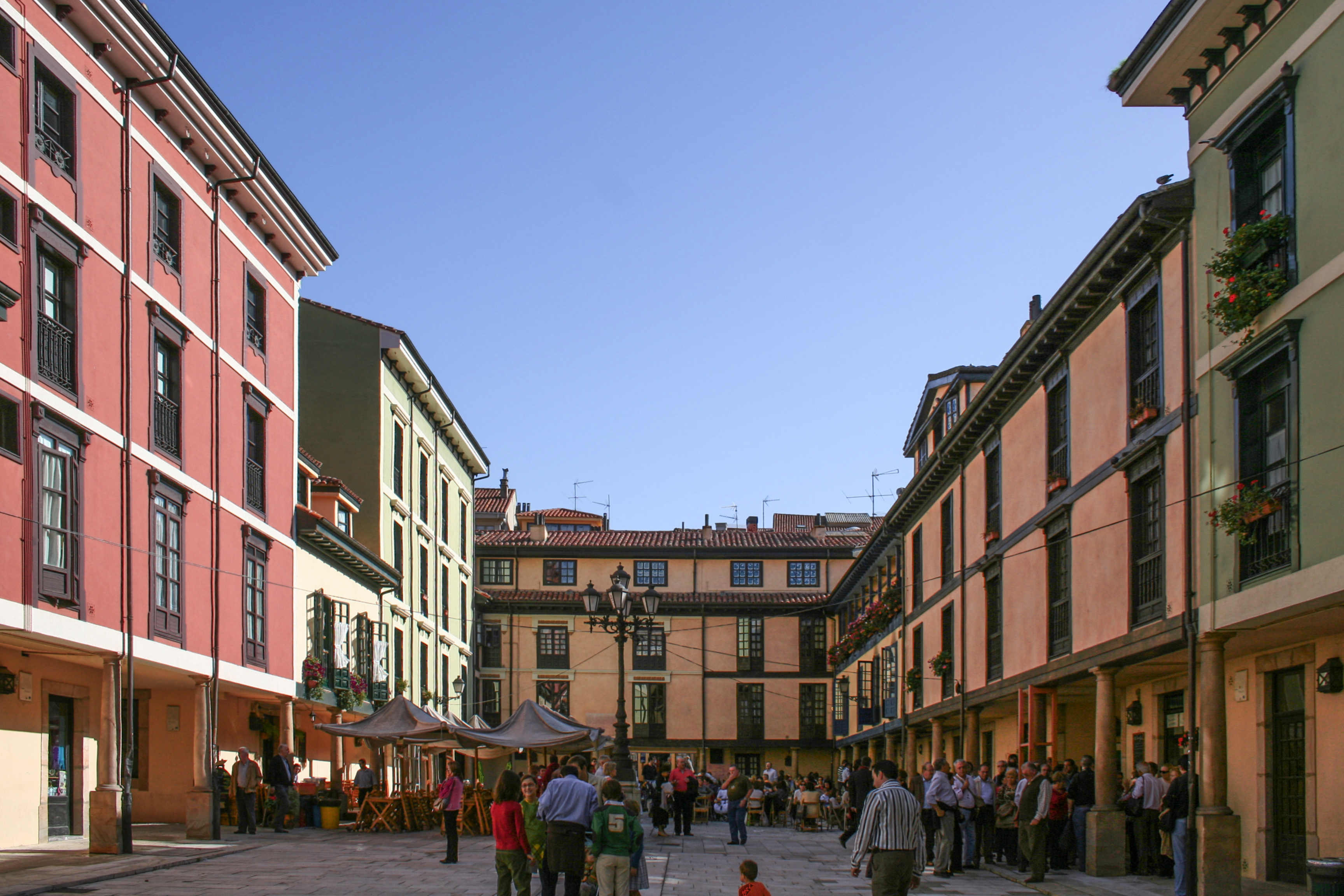 Interior plaza del fontan